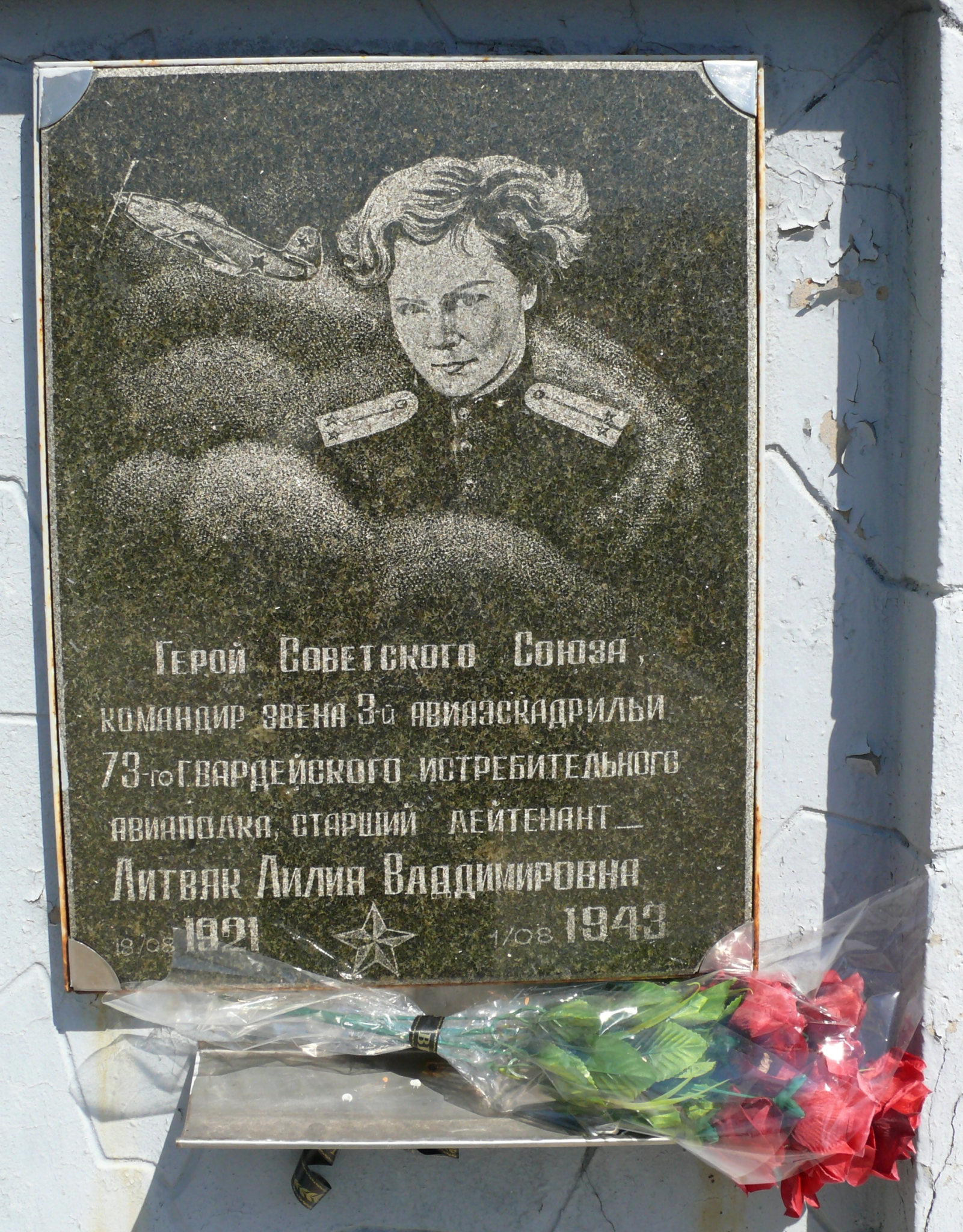 Мемориальная плита на месте захоронения в с. Дмитровка Шахтерского района Донецкой обл.